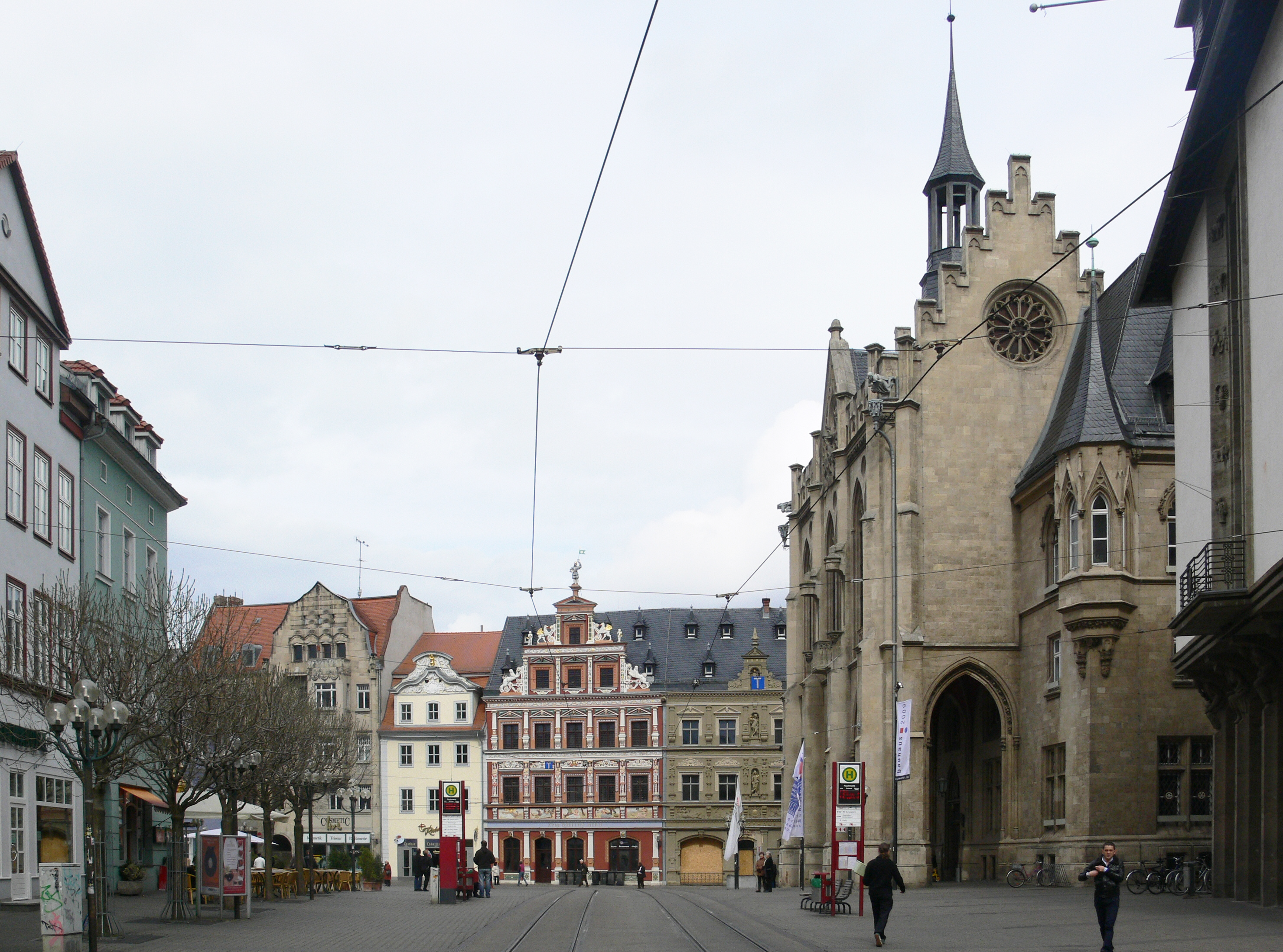 Fischmarkt, Erfurt Blick aus Richtung Schlösserstraße zum Fischmarkt (Häuserzeile mit Haus zum Breiten Herd und Gildehaus), rechts das Rathaus